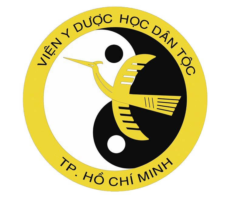 Logo Viện Y dược học dân tộc